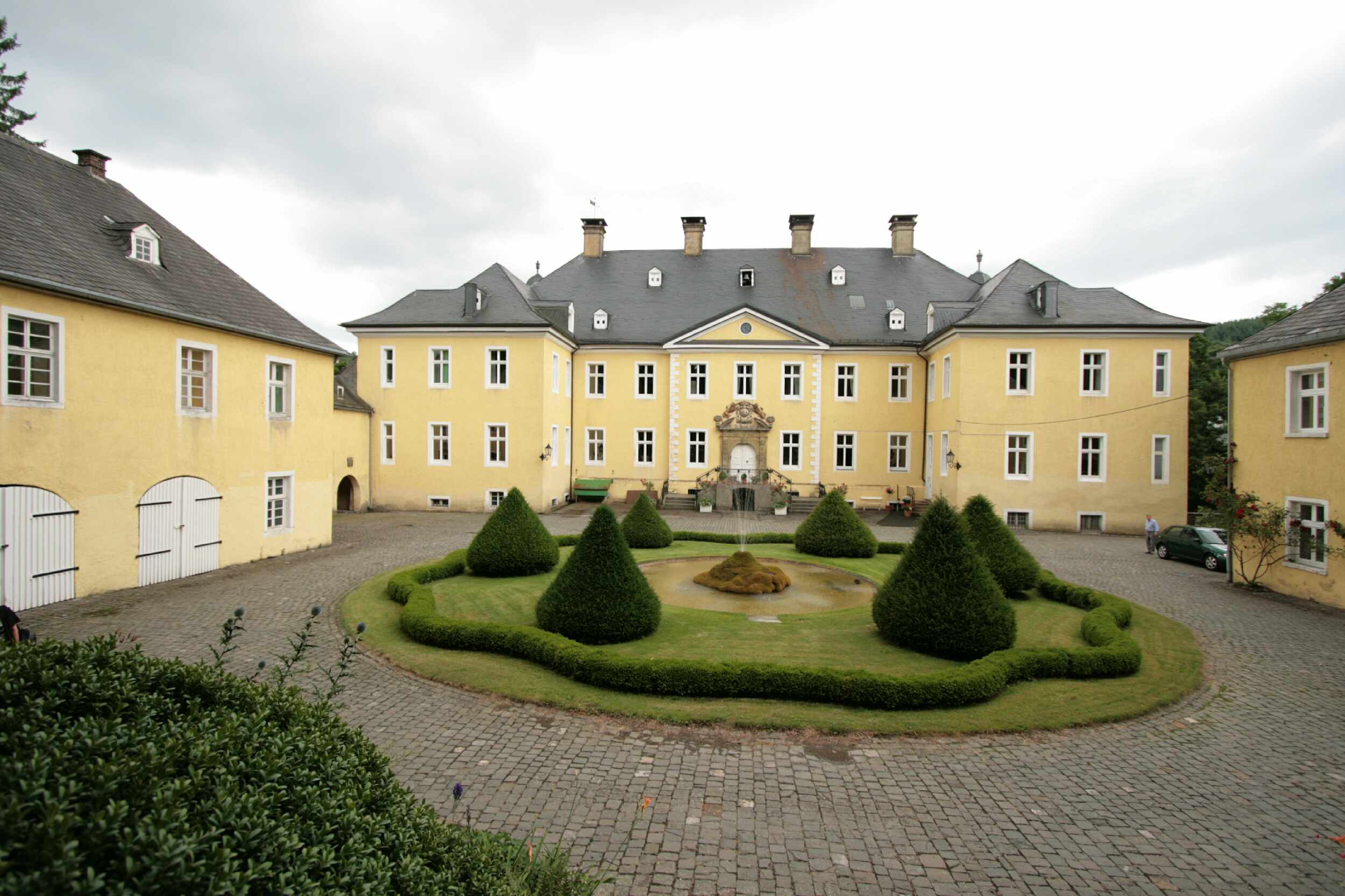 Schloss Antfeld in Olsberg, Innenhof